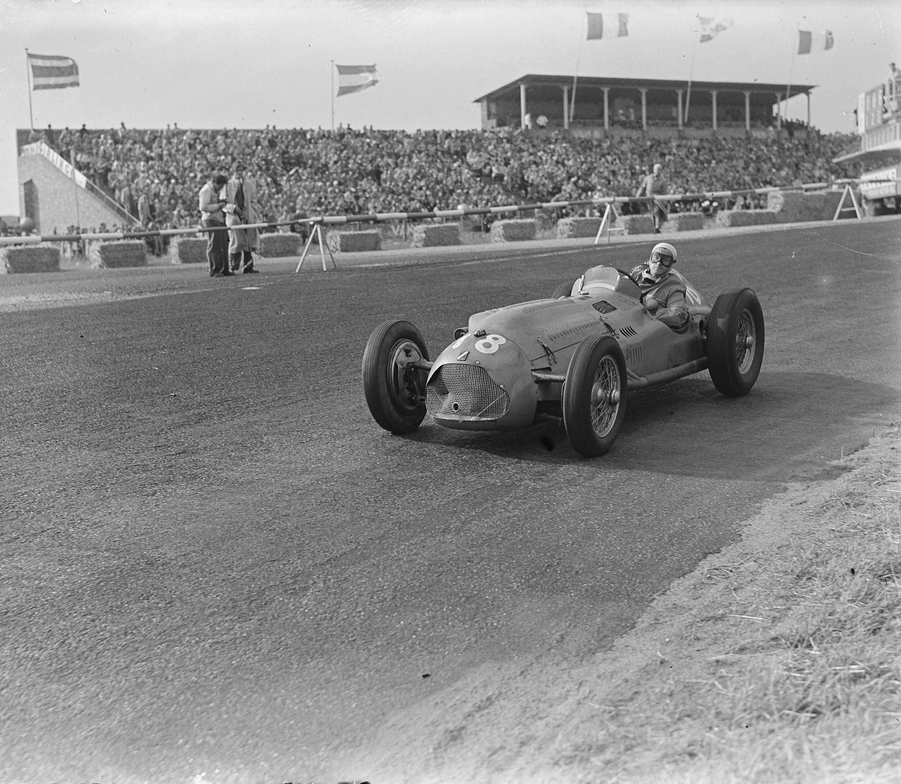 Louis Rosier lors du Grand Prix des Pays-Bas 1950 sur Talbot-Lago.